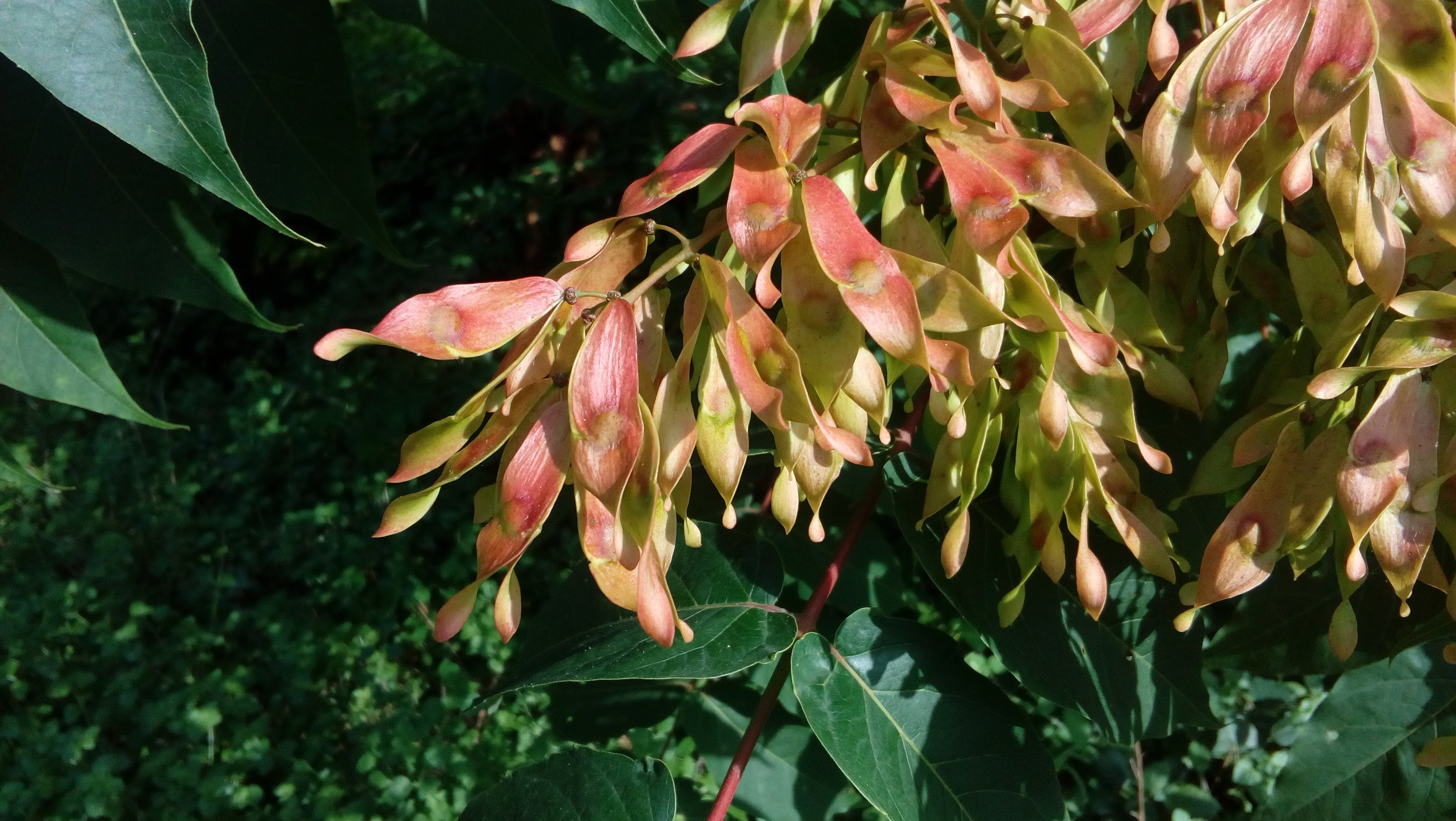 Ailanthus altissima, Santa Coloma de Farners (Catalunya)